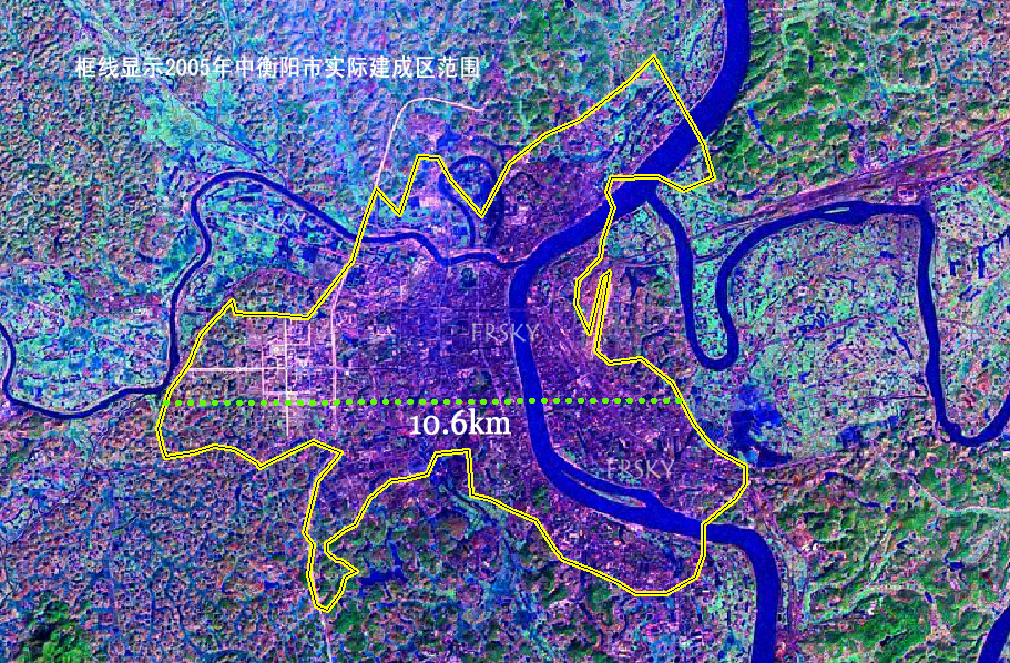 Hengyang City Sat Img